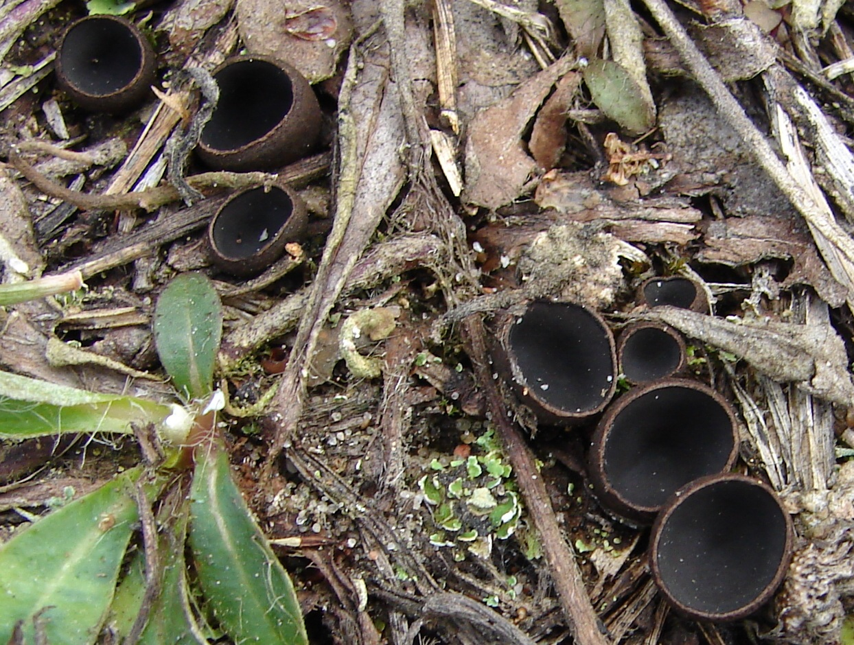 «Прип'ять-Стохід», Любешівський р-н, ДП «Любешівське ЛМГ», ДП СЛАП «Любешівагроліс», с/р